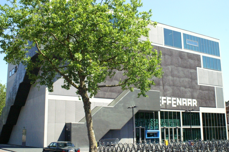 Pop stage Effenaar, in Eindhoven